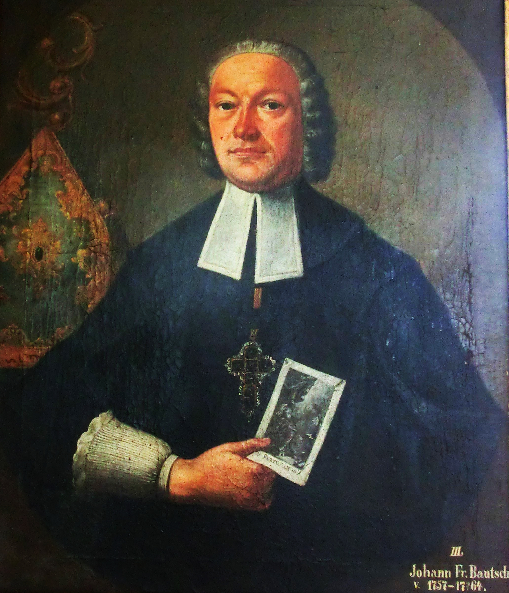 1764 Jan František Bautsch, 3. infulovaný arciděkan Horní Police.